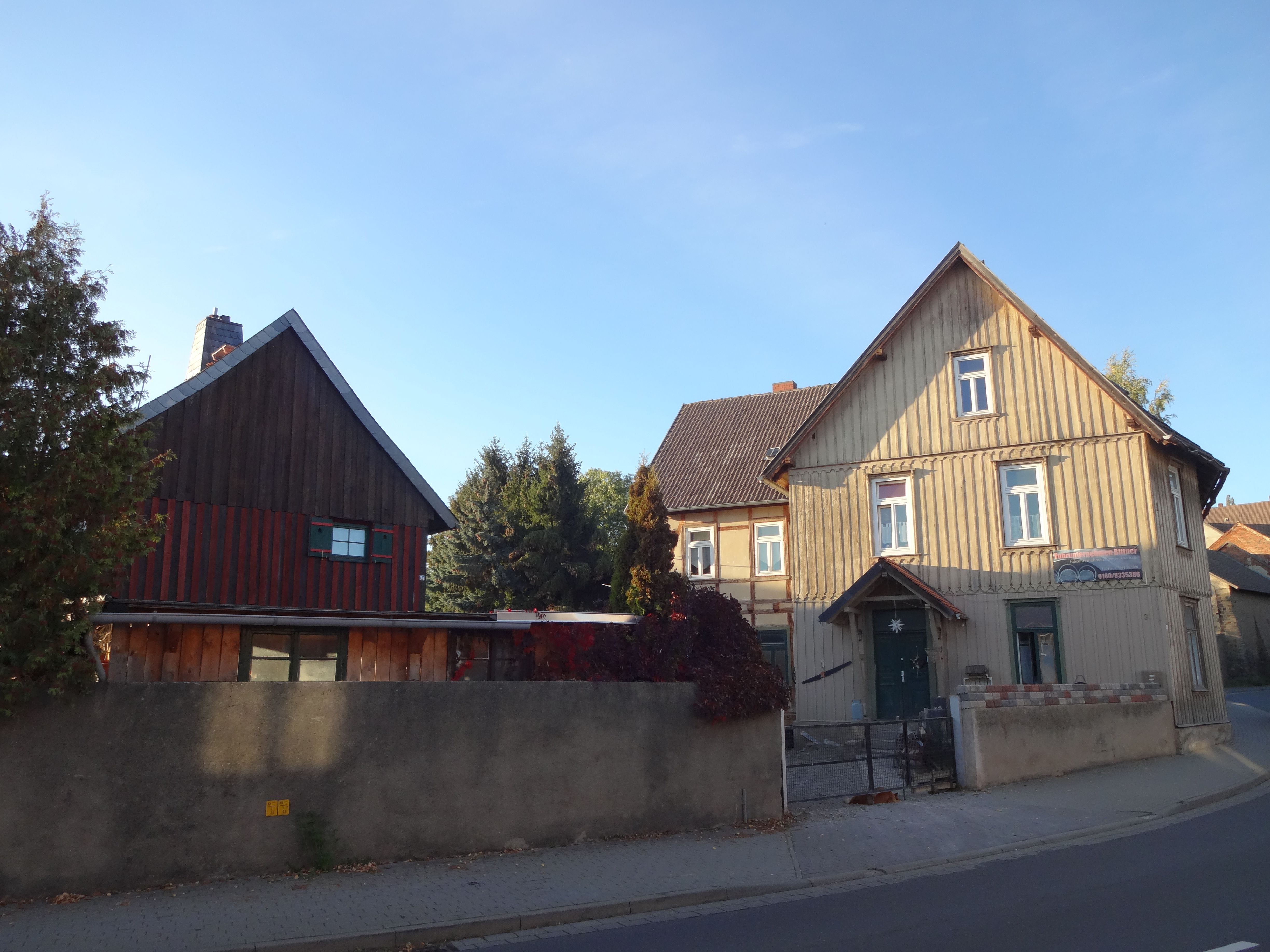 denkmalgeschütztes Pfarrhaus in der Hasselfelder Straße 3, 3a in Cattenstedt